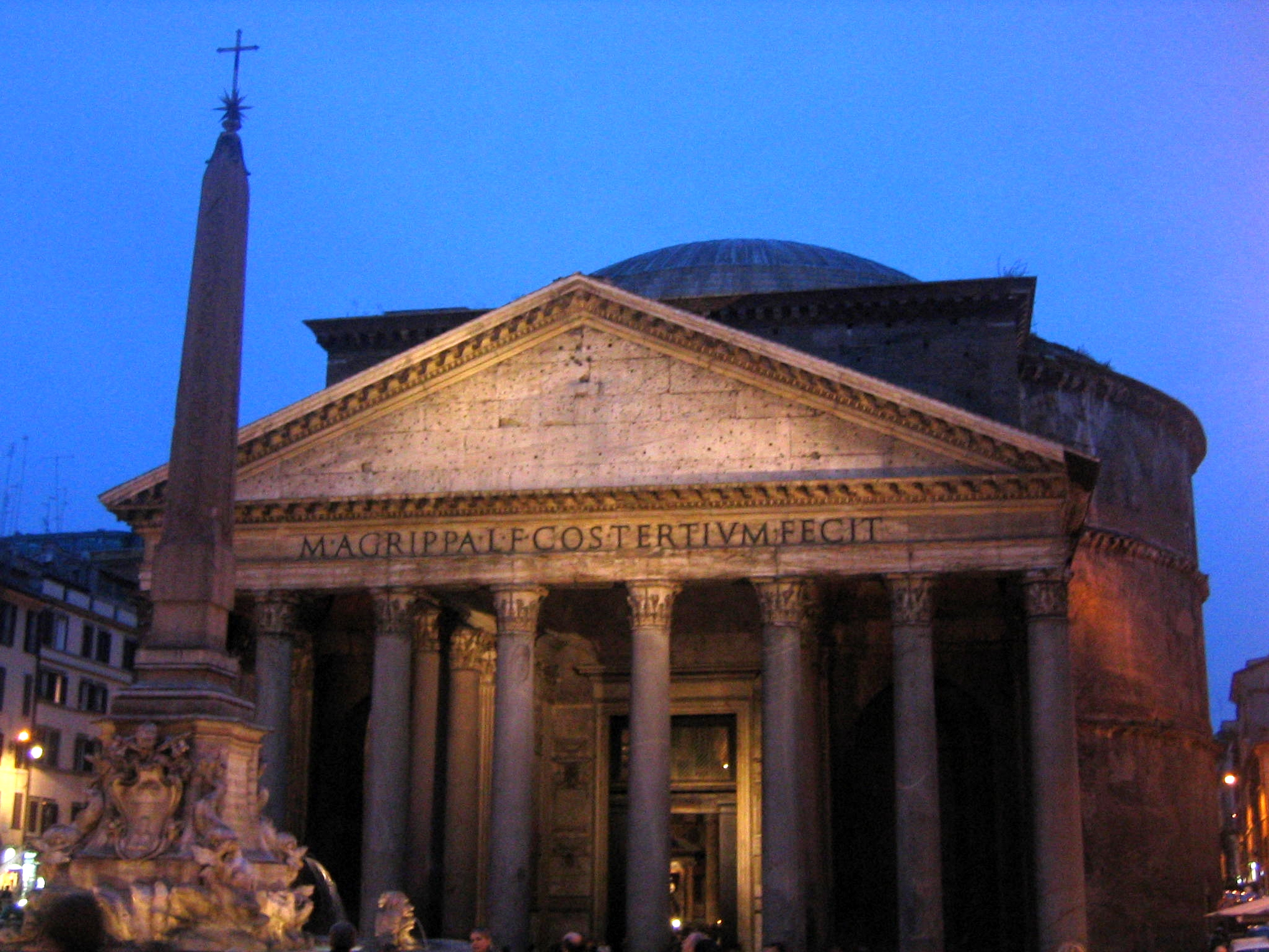 Il Pantheon di sera